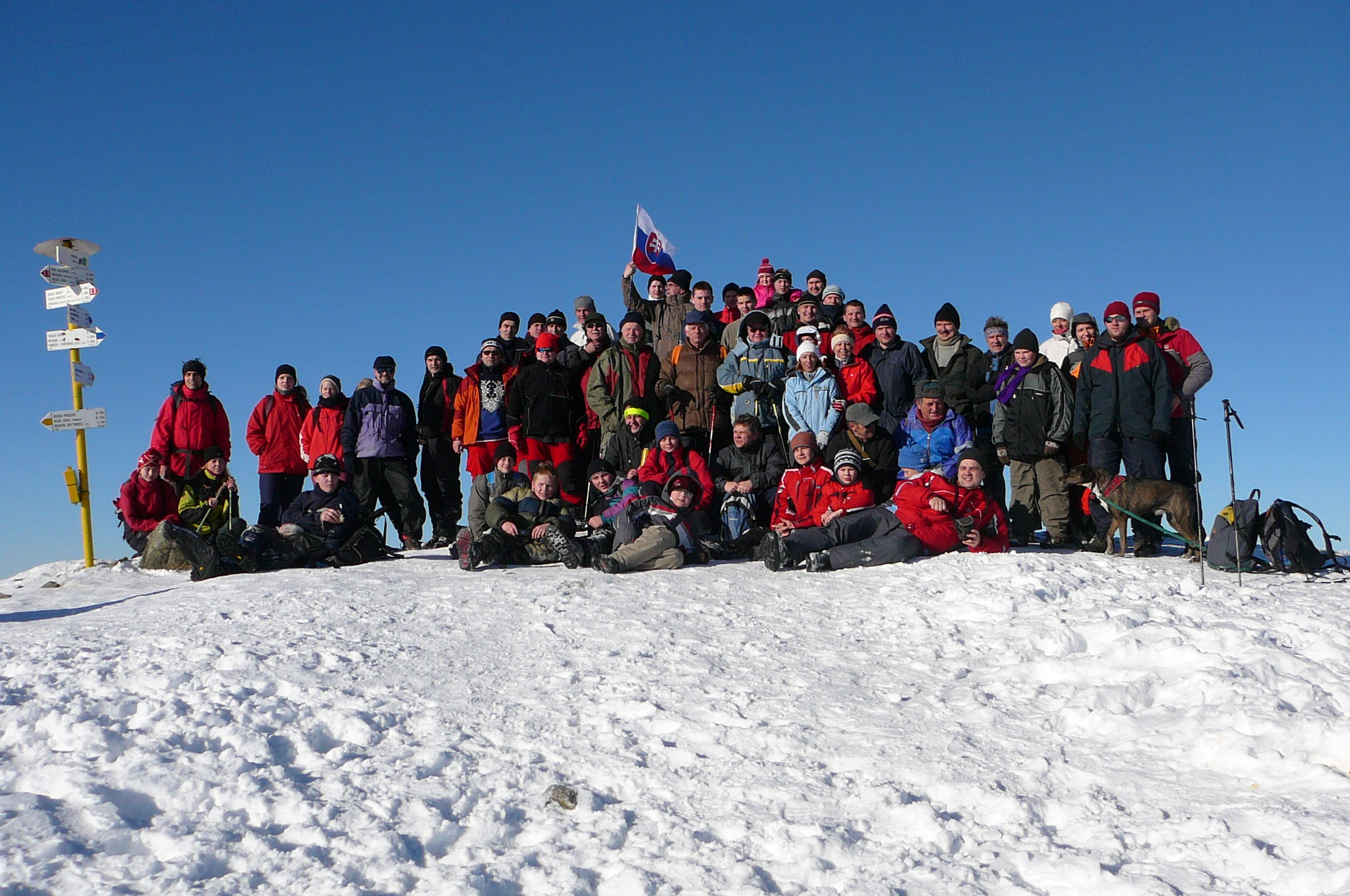 Silvestrovský výstup KST Višňové